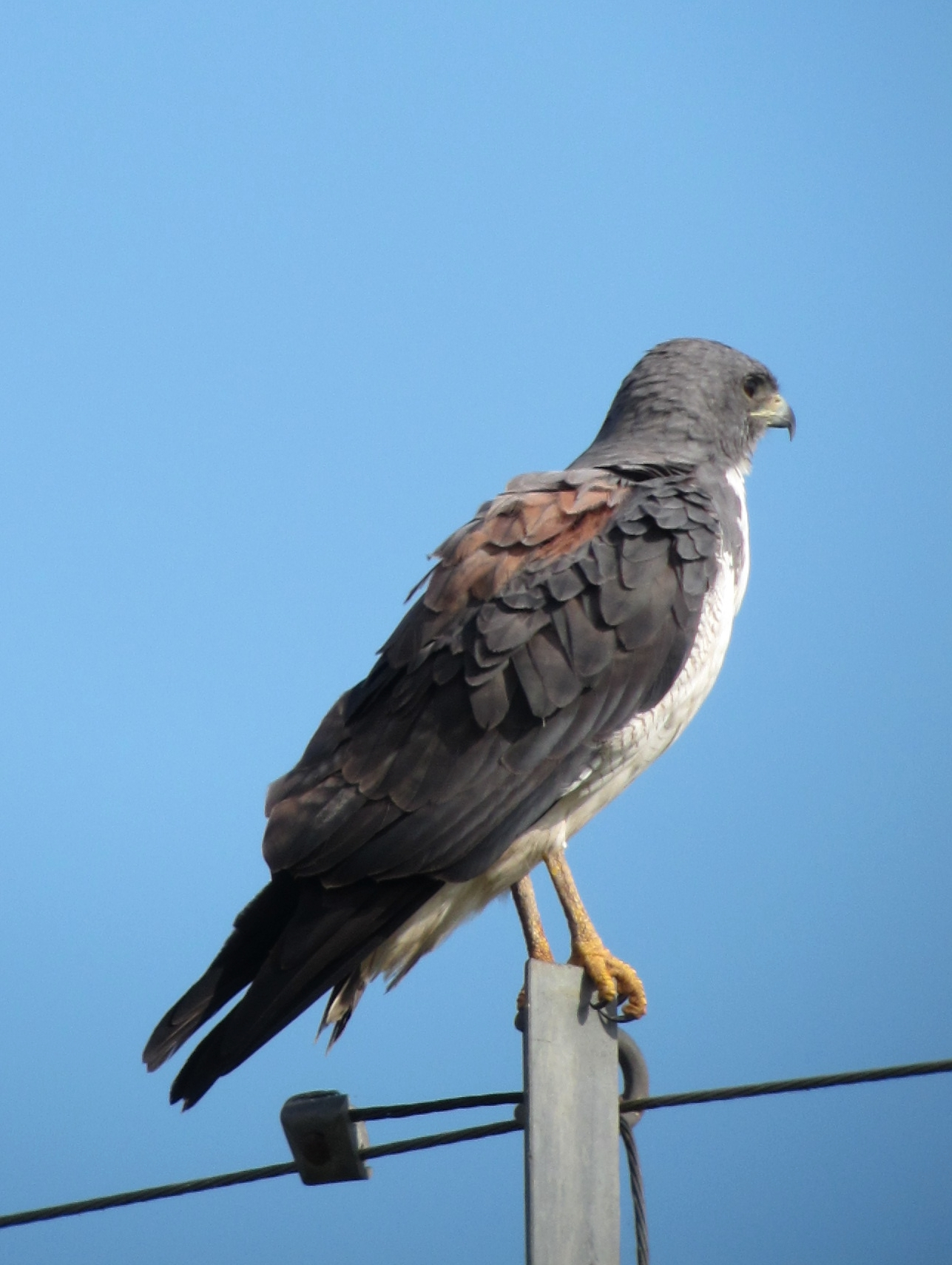 Arauca, Arauca, Colombia